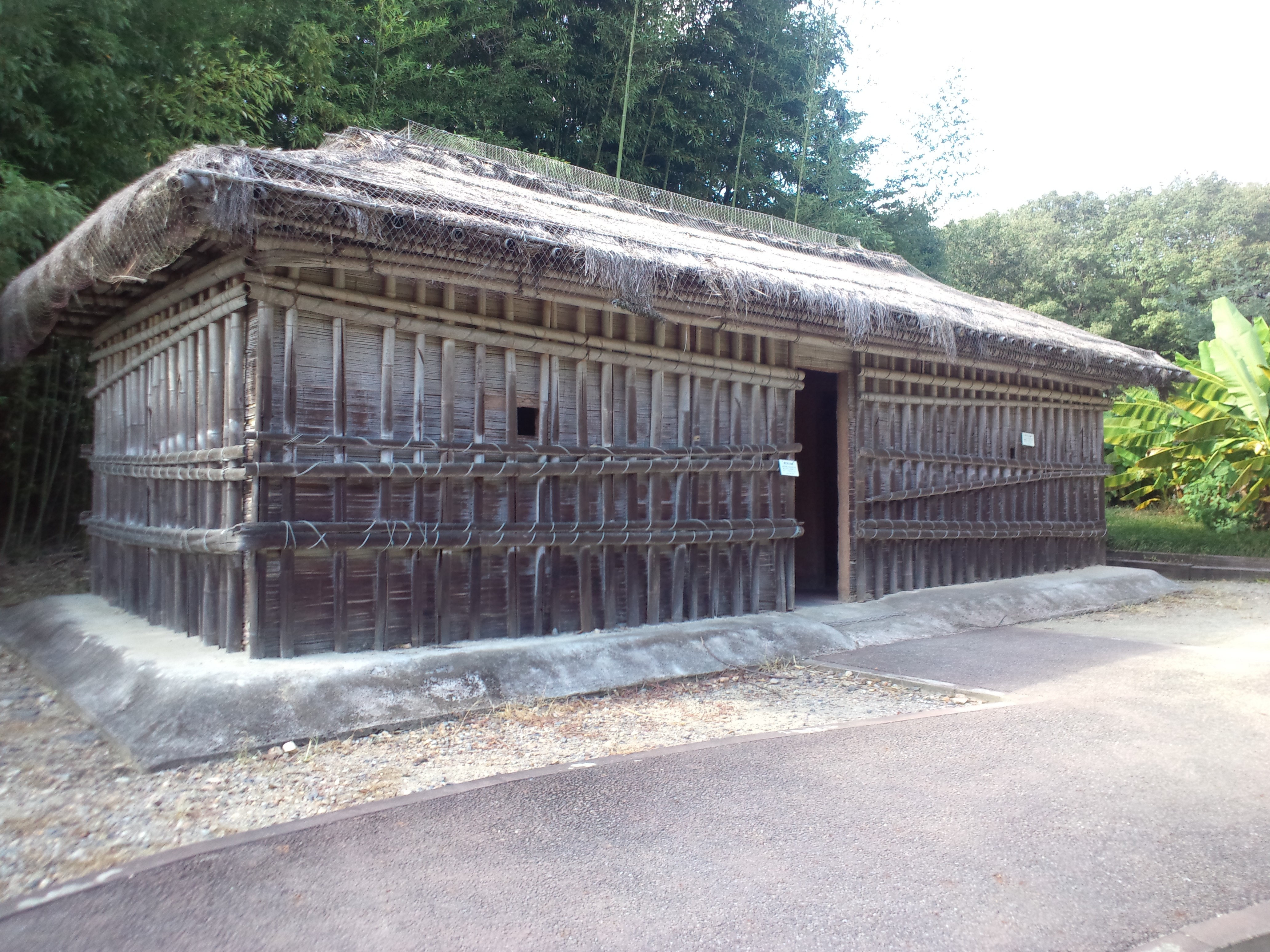 リトルワールド タンザニア ニャキュウサの家 第2夫人の家